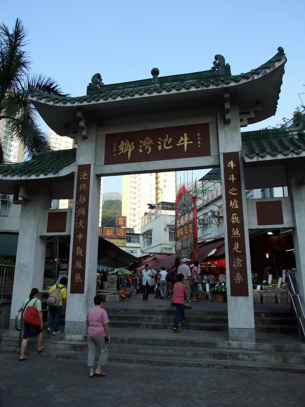 牛池灣鄉牌樓